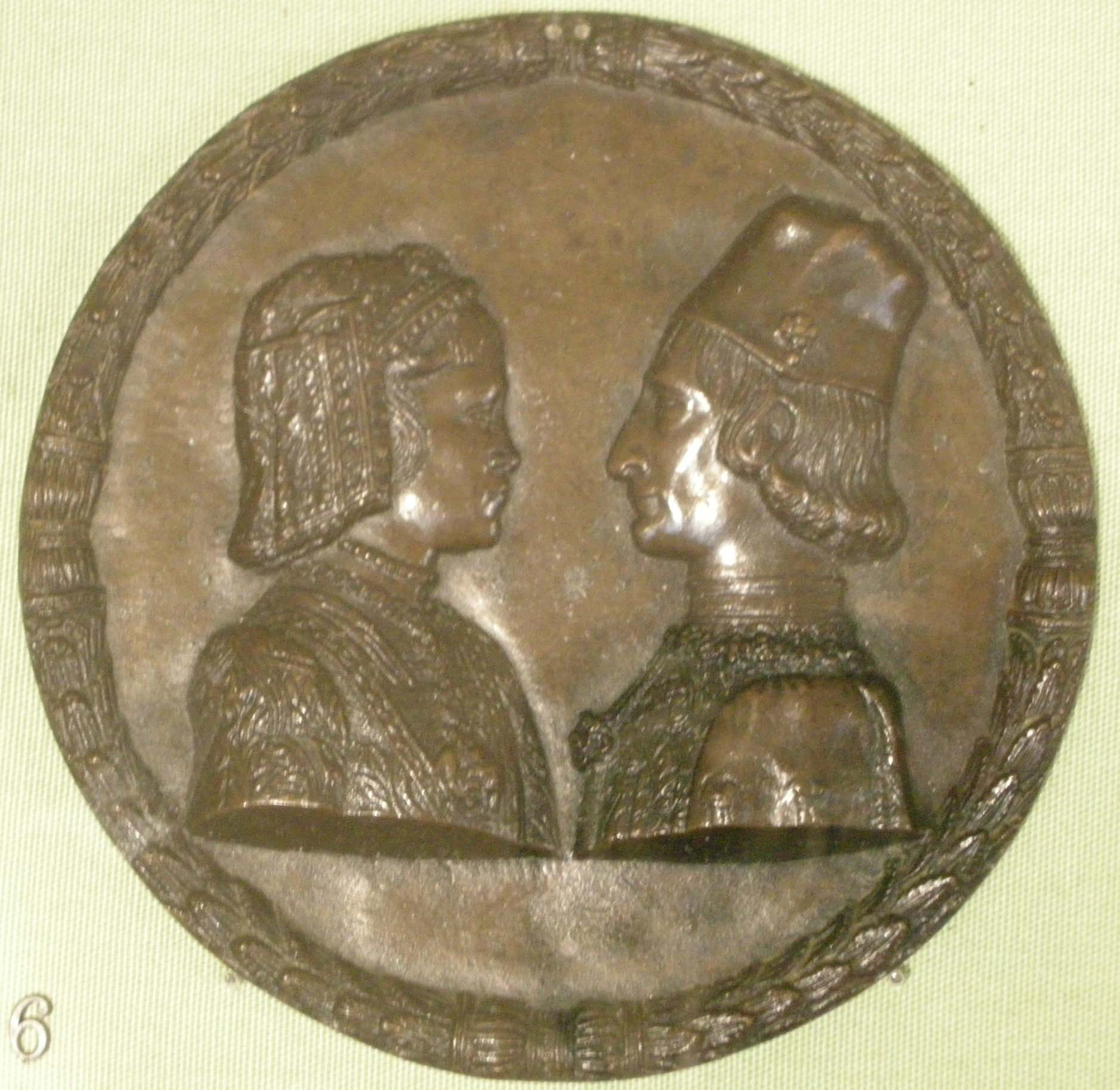 Ercole I e Eleonora d'Aragona, 1473 ca.